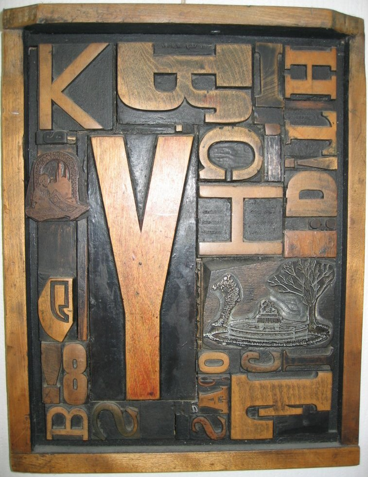 Assemblage décoratif de caractères typographiques en bois et de vignettes.